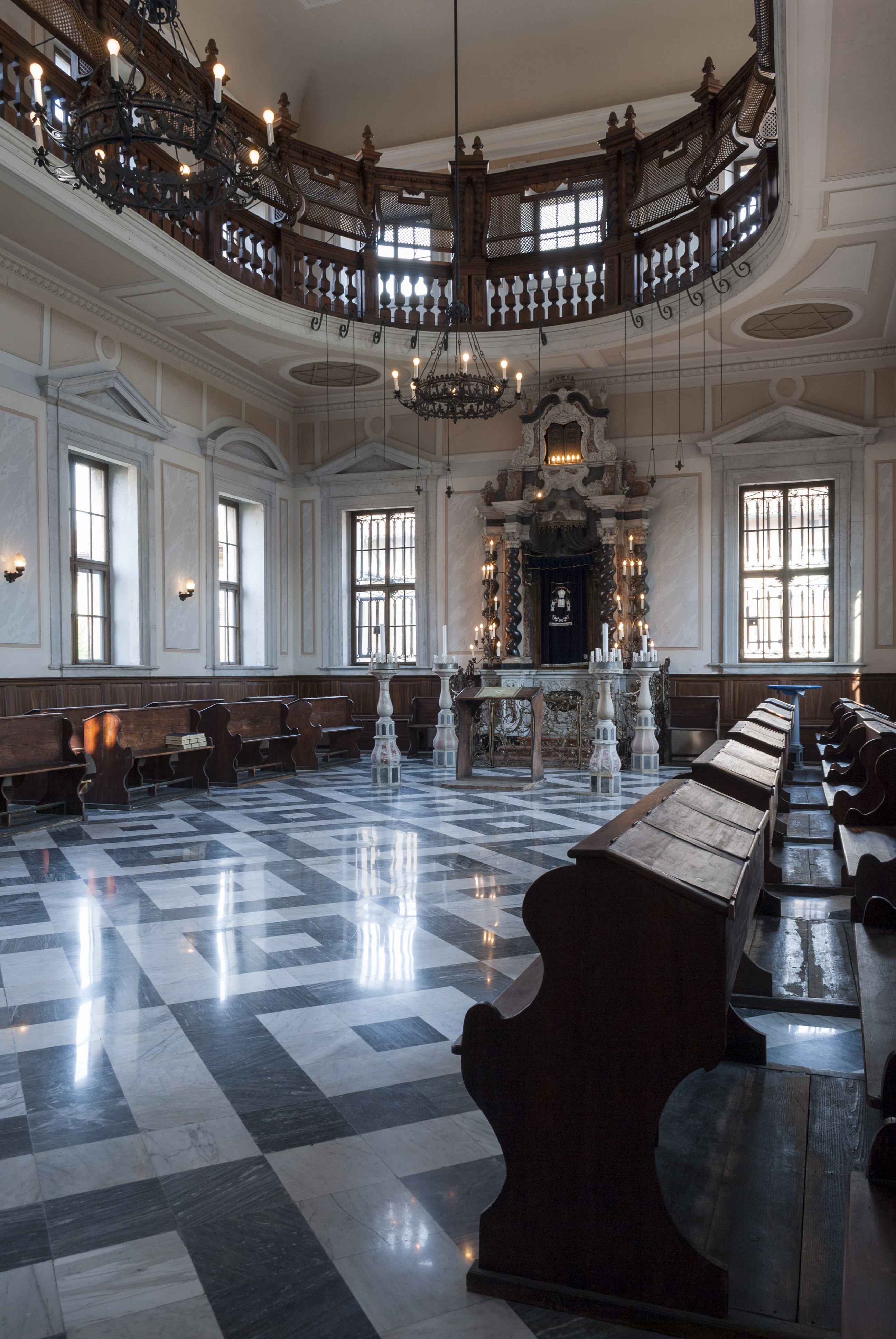 Vista interna della Sinagoga di Gorizia. Unknown